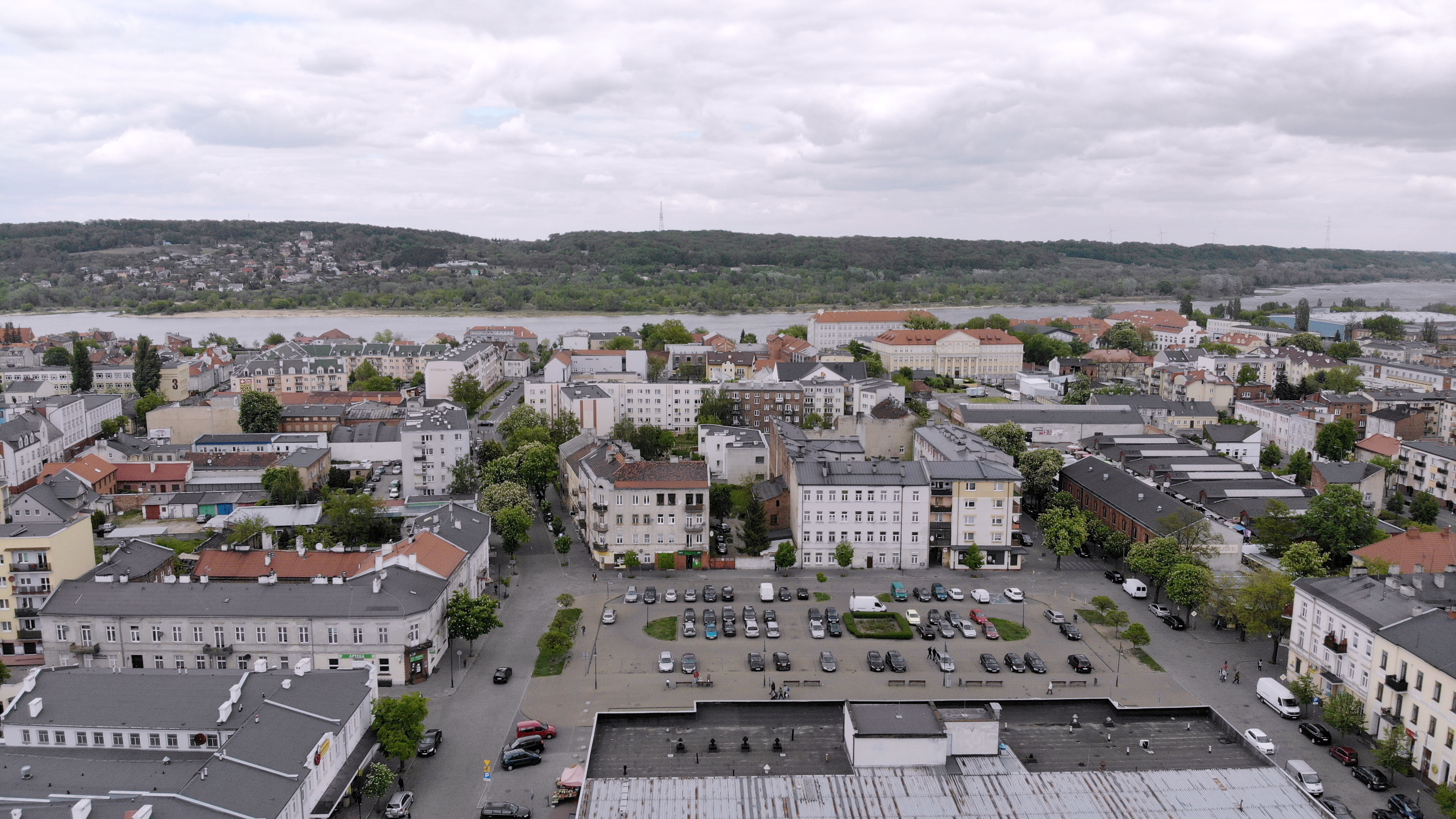 Śródmieście (2020 r.)